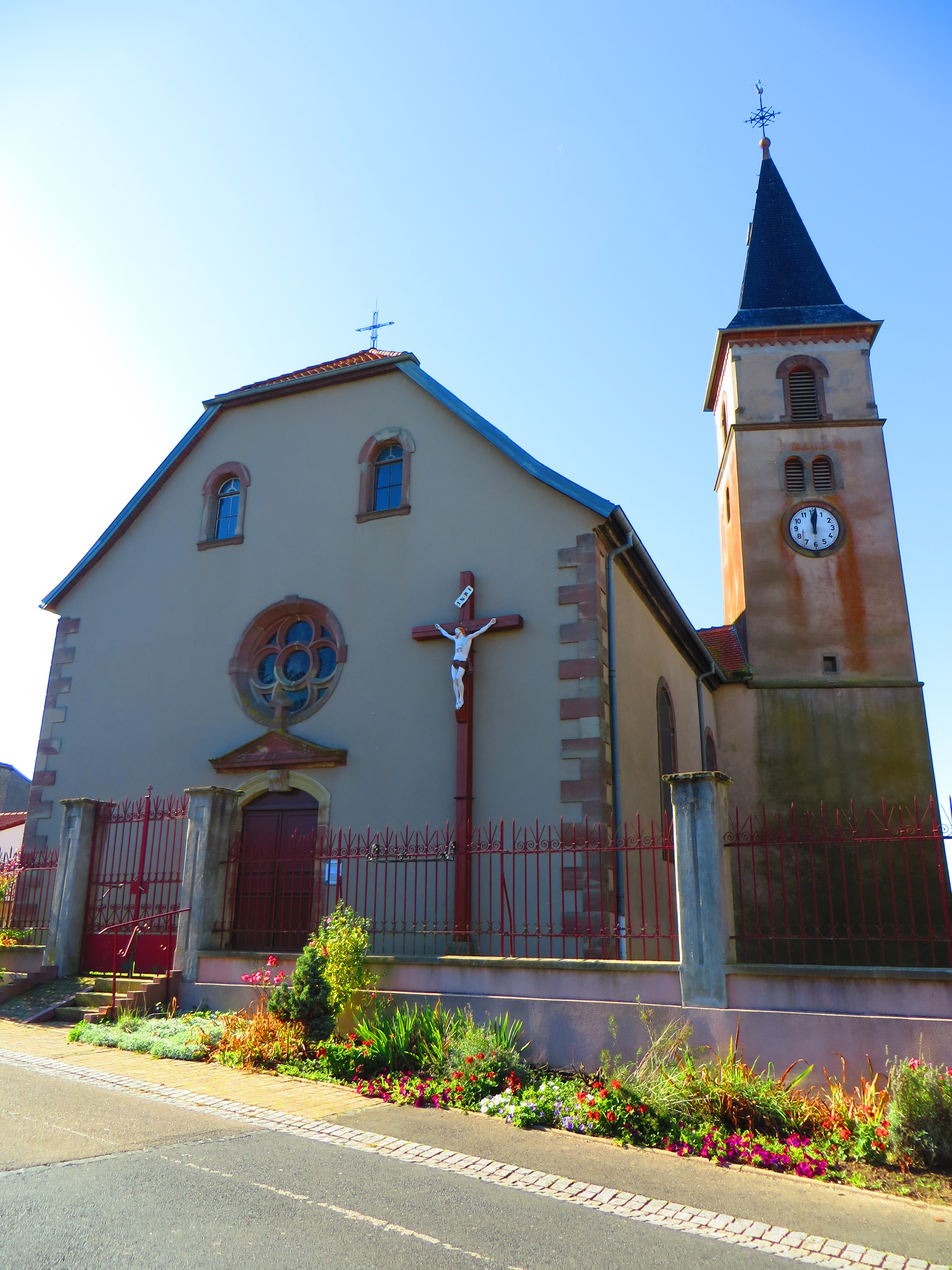 Kerprich aux Bois Église Saint-Pierre-aux-Liens